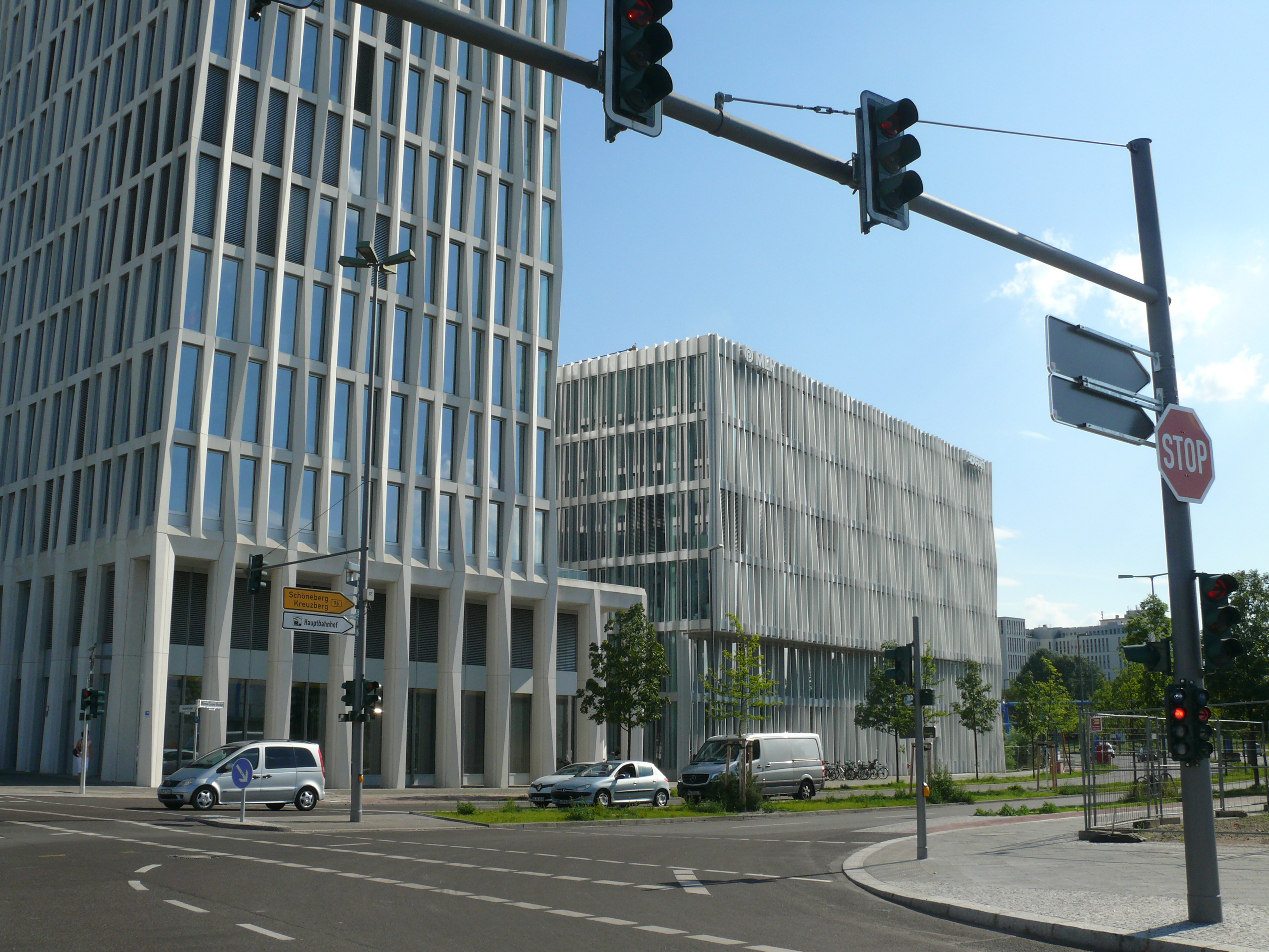 Berlin-Moabit Heidestraße/Minna-Cauer-Straße 2016